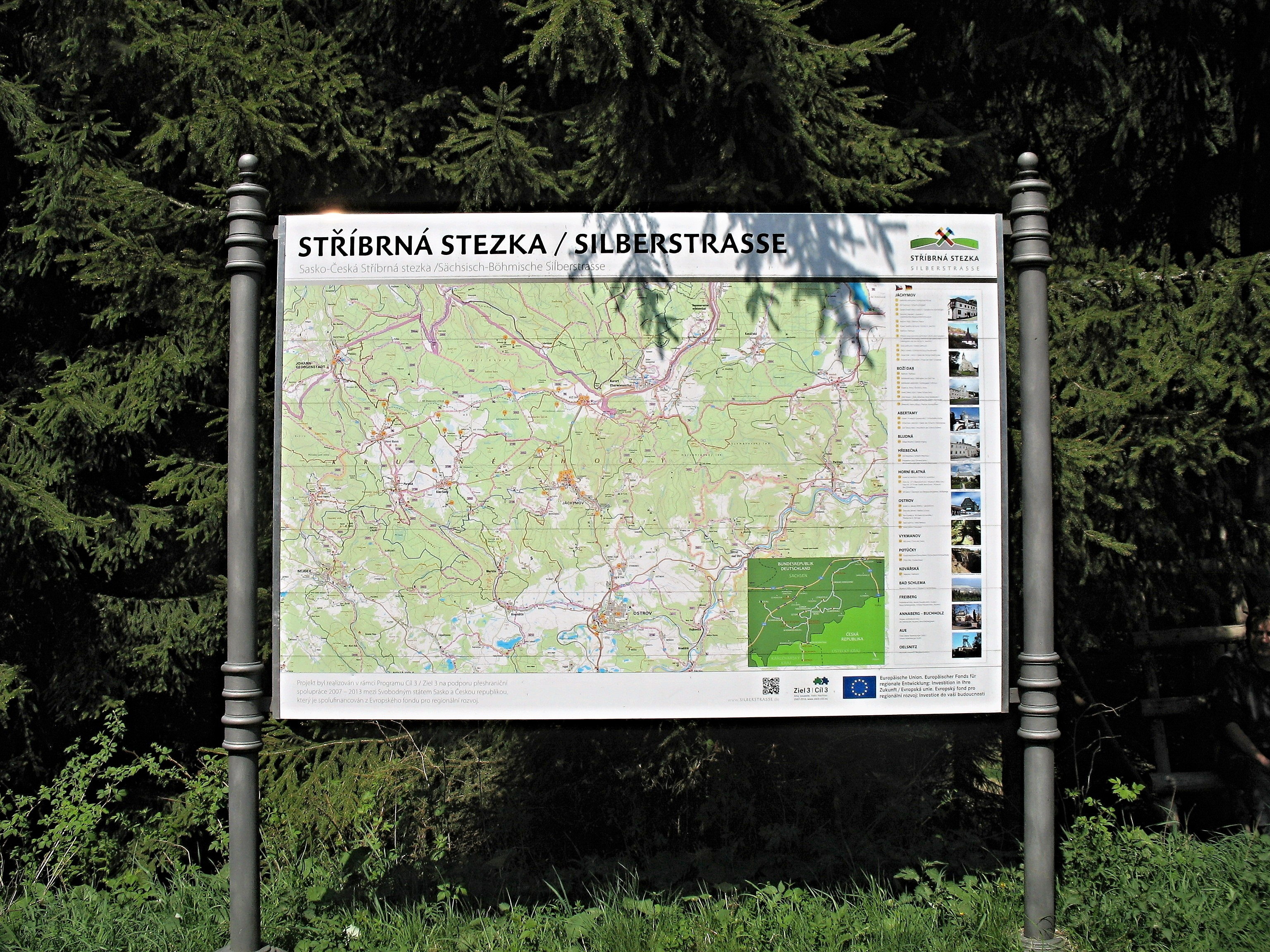 Informační tabule Stříbrné stezky/Silberstrase poblíž vstupního portálu štoly Hermann, Zlatý Kopec (Boží Dar), Krušné hory